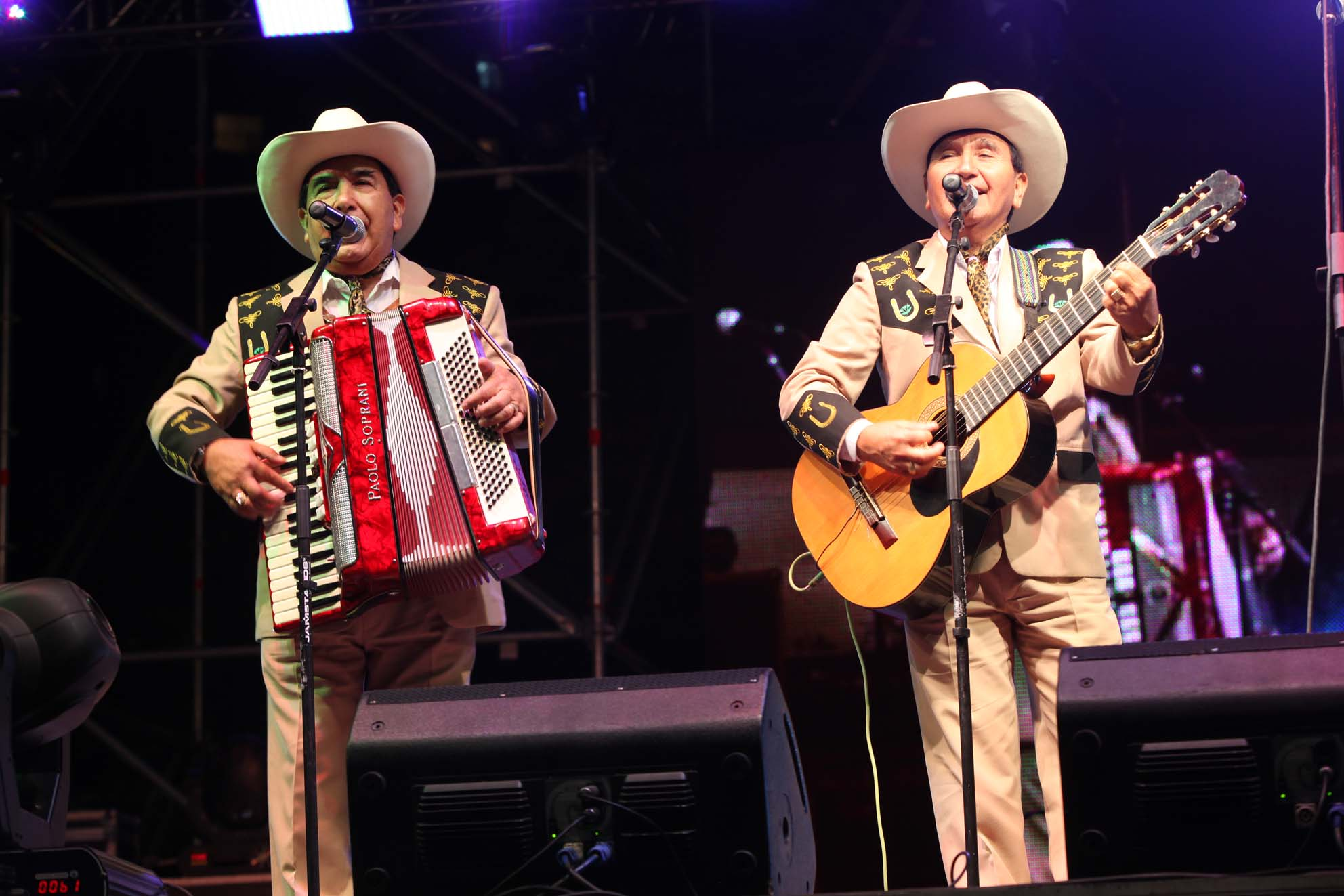 Los Hermanos Bustos. Género: Tropical / Ranchera y corrido / Bolero Integrantes: Fernando Bustos, voz y acordeón (1965 - •). Ismael Bustos, voz y guitarra (1965 - •).